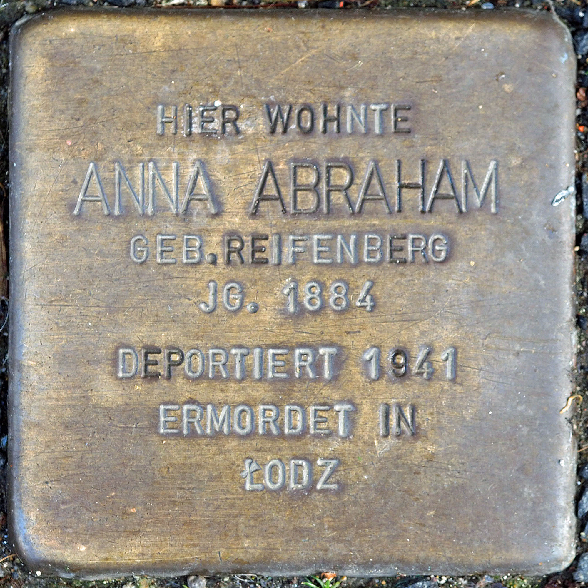 Stolpersteine MG: Abraham, Anna